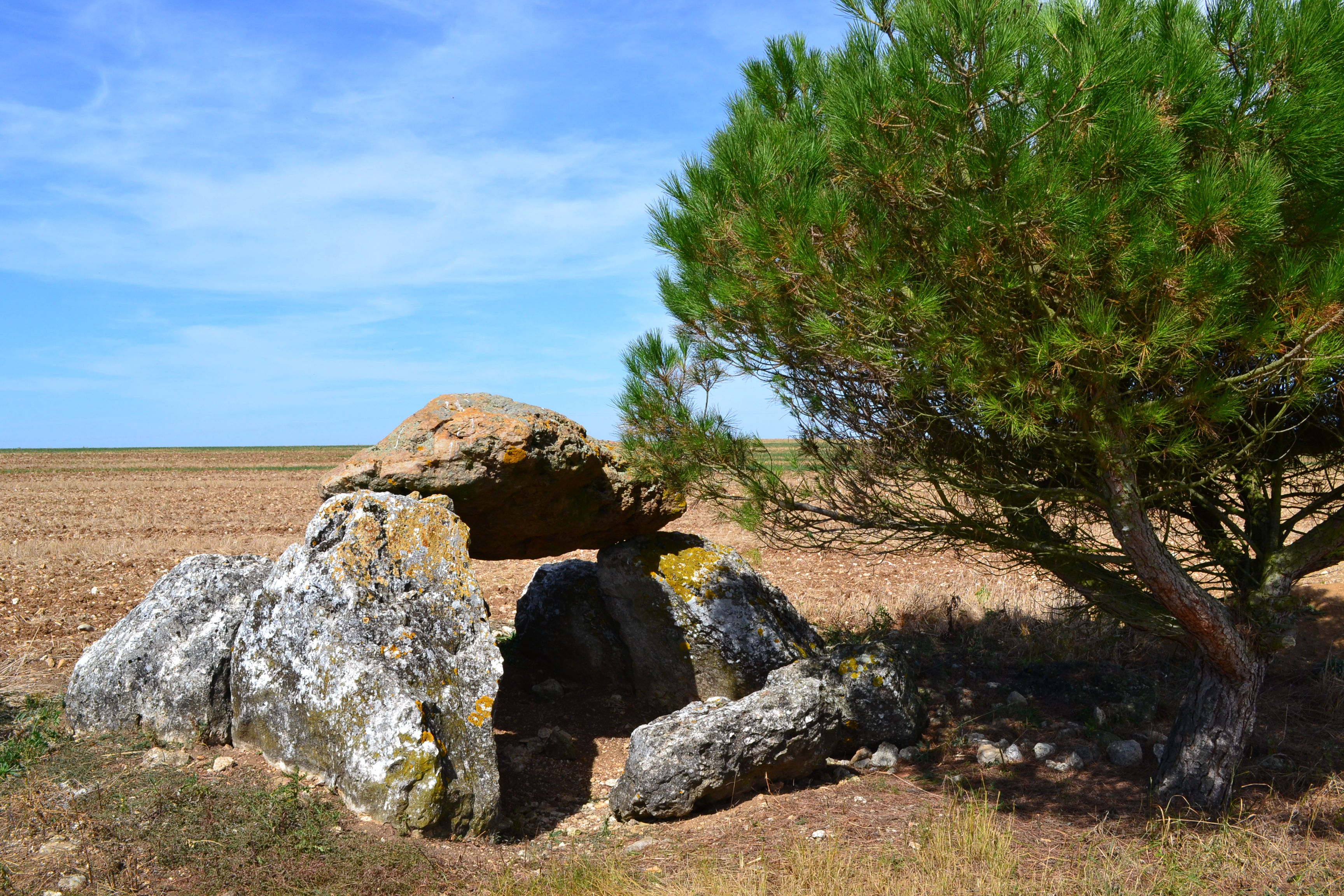 Dolmen de Cornevache datant du Néolithique